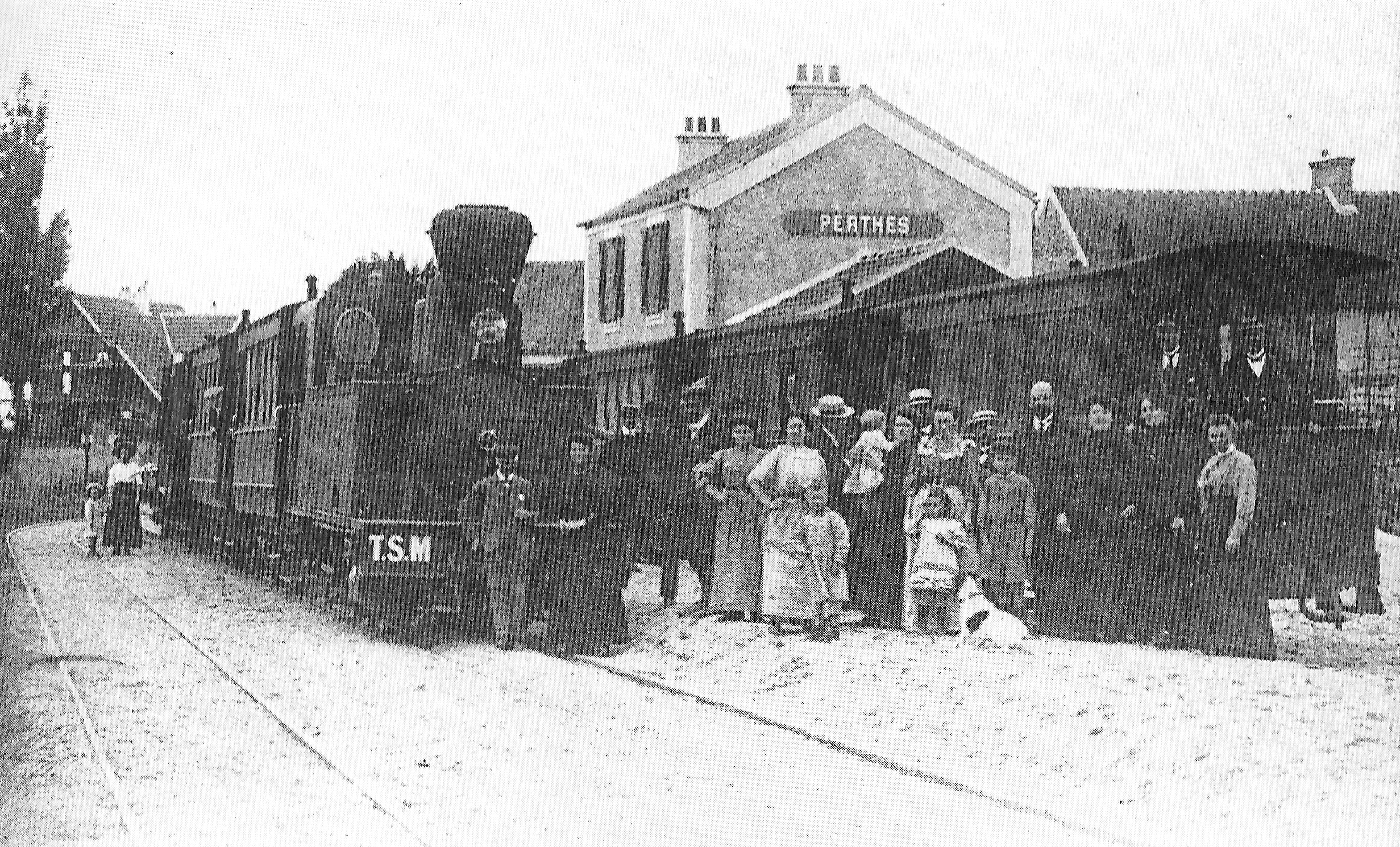 La gare de Perthes de la ligne du Tramway Sud de Seine-et-Marne, vers 1917 (au premier plan, le train pour Chailly-en-Bière ; au second plan , le train pour Cély-en-Bière) - Perthes, Seine-et-Marne, France.